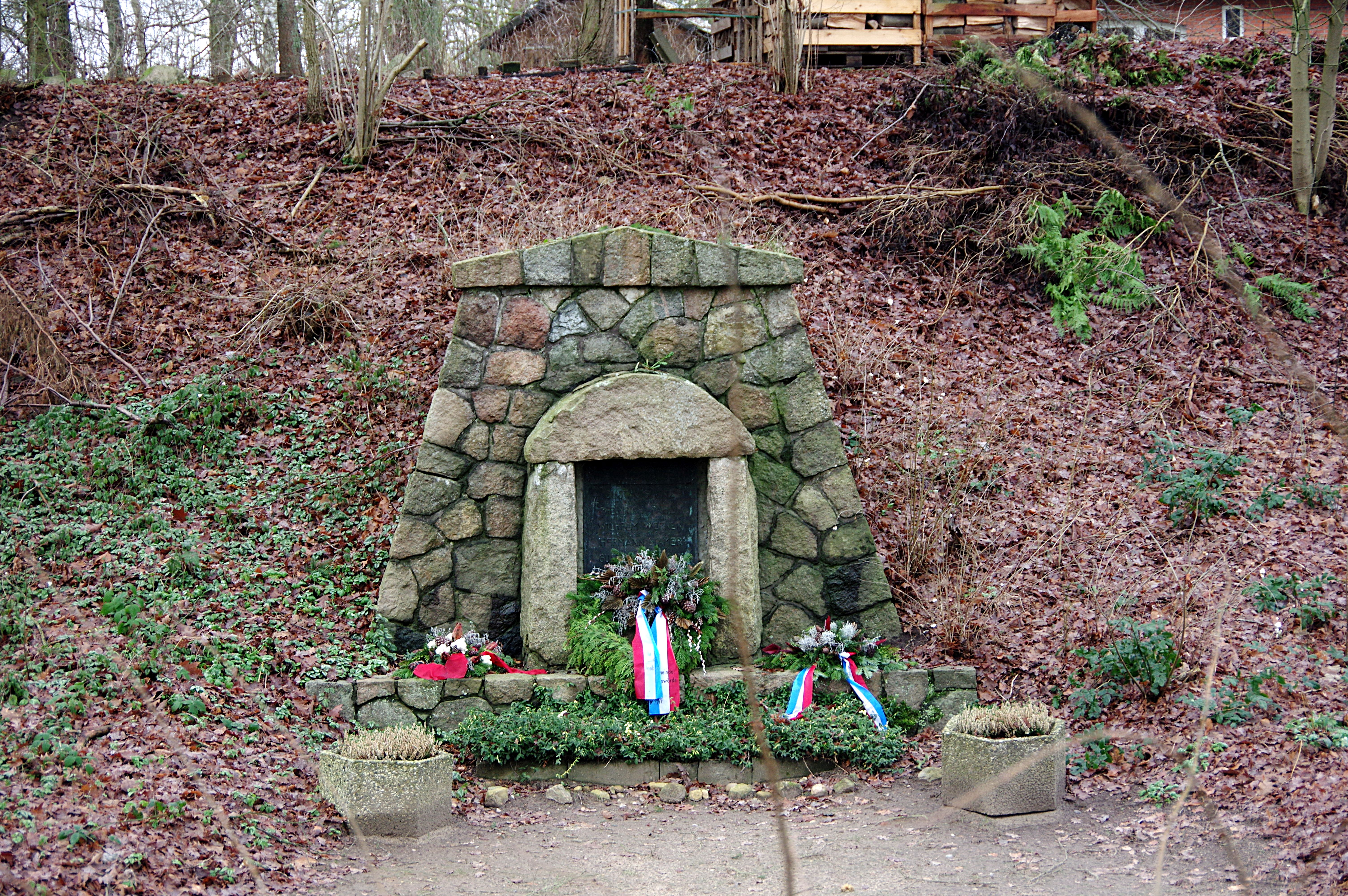 Grande in Schleswig-Holstein. Das Kriegerdenkmal befindet sich am südlichen Ortsausgang.